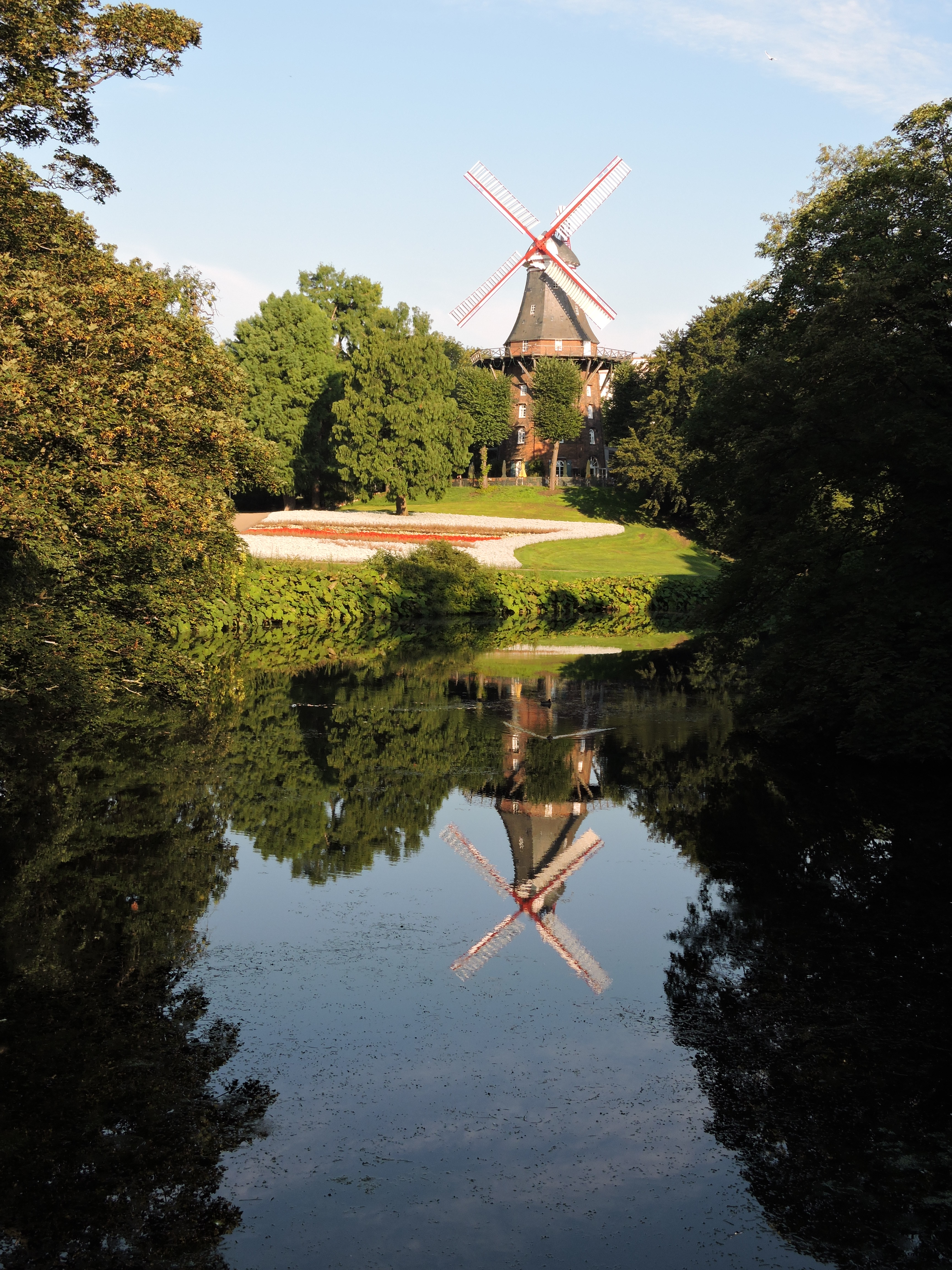 Die Mühle am Wall gespiegelt im Wasser - Herdentorswallmühle